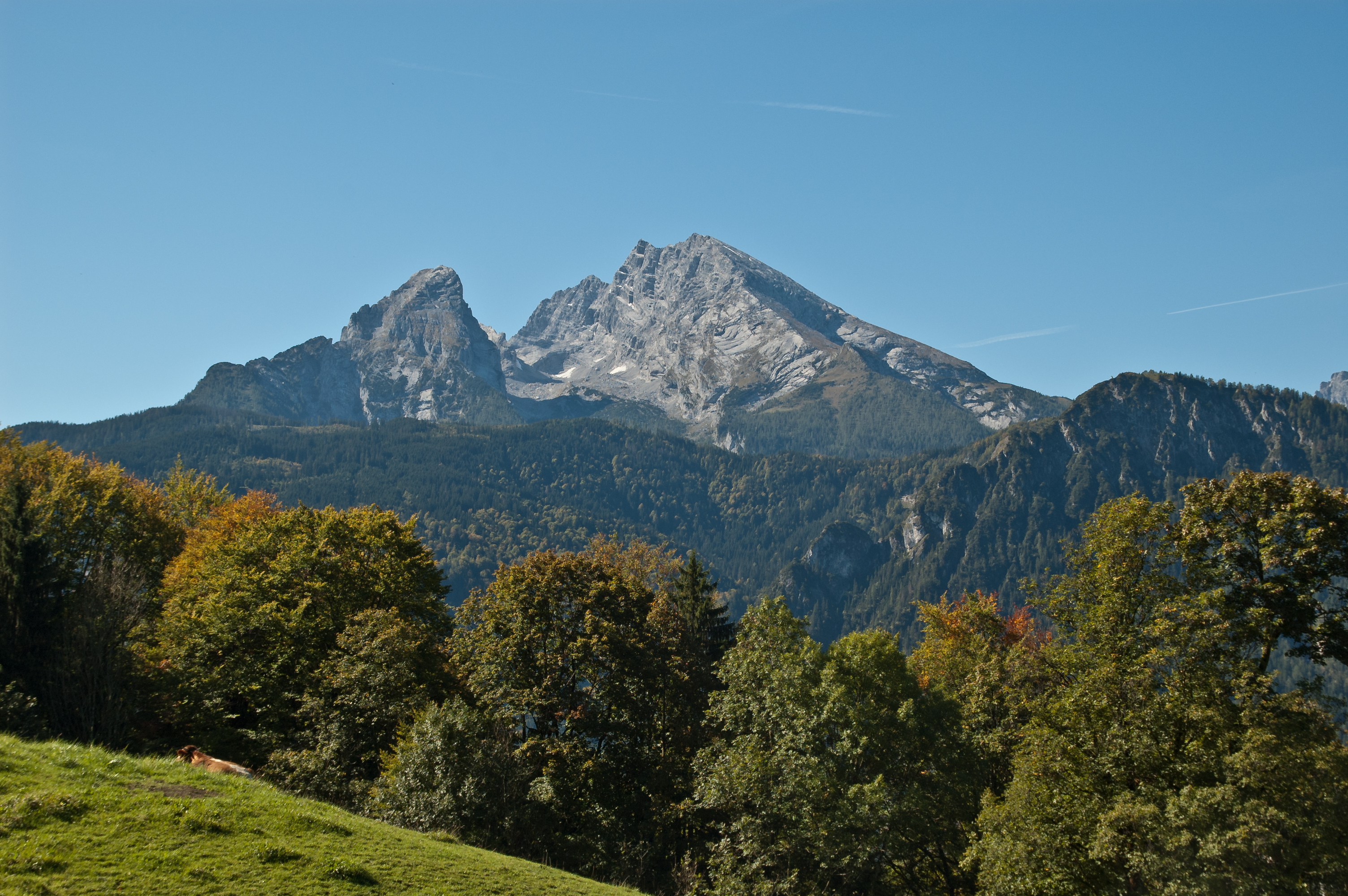 Das Watzmannmassiv, gesehen von Hinterbrand aus